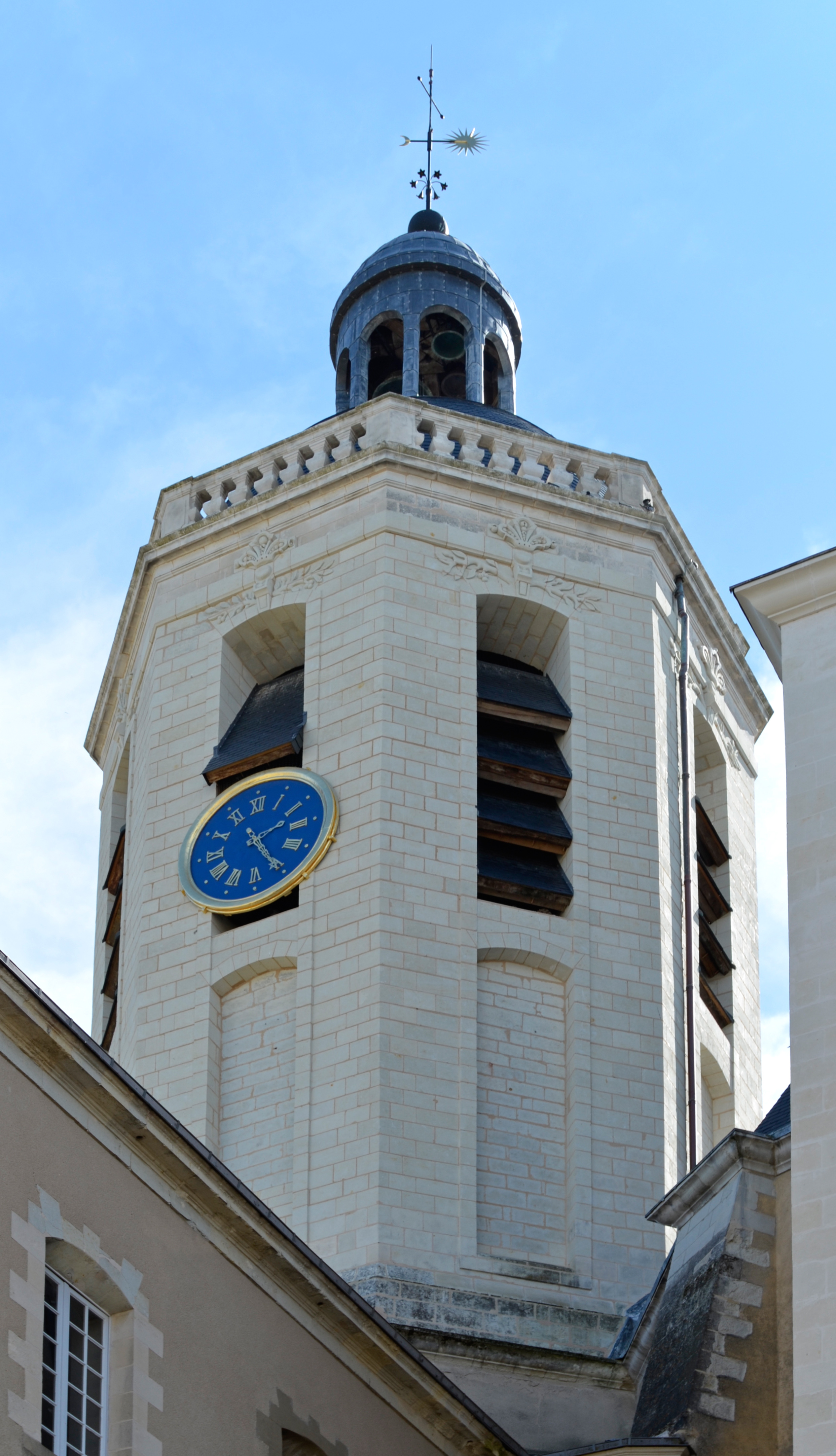 Ancien collège des Jésuites, actuellement Prytanée national militaire - La Flèche (Sarthe) .